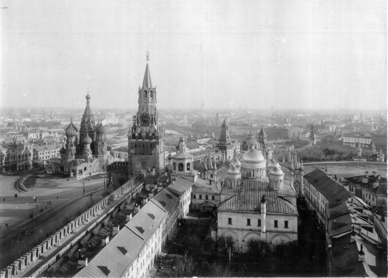 Москва. Кремль. Вид на Вознесенский монастырь , фото конца 19 в.